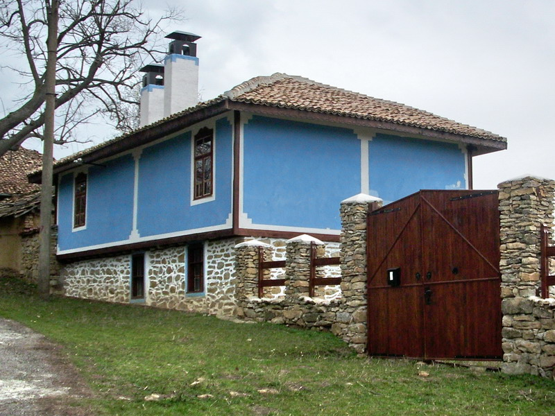 Секо Берковски, община Попово. Обновена стара селска къща.